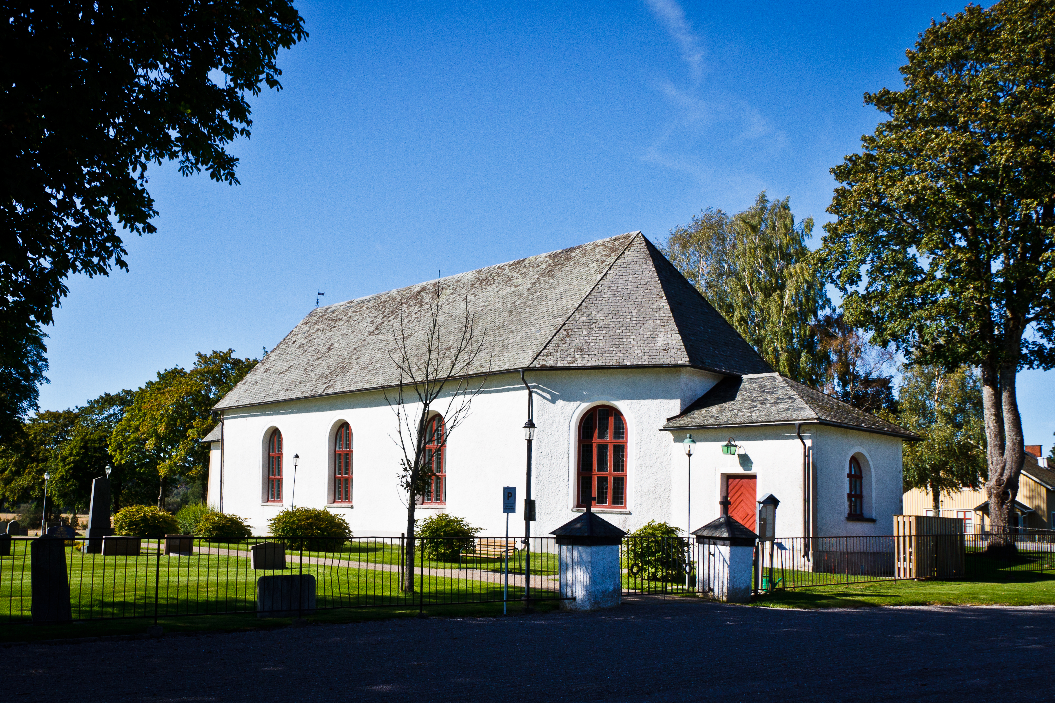 Gunnarsnäs kyrka (Gunnarsnäs Kyrka 1:1), Mellerud